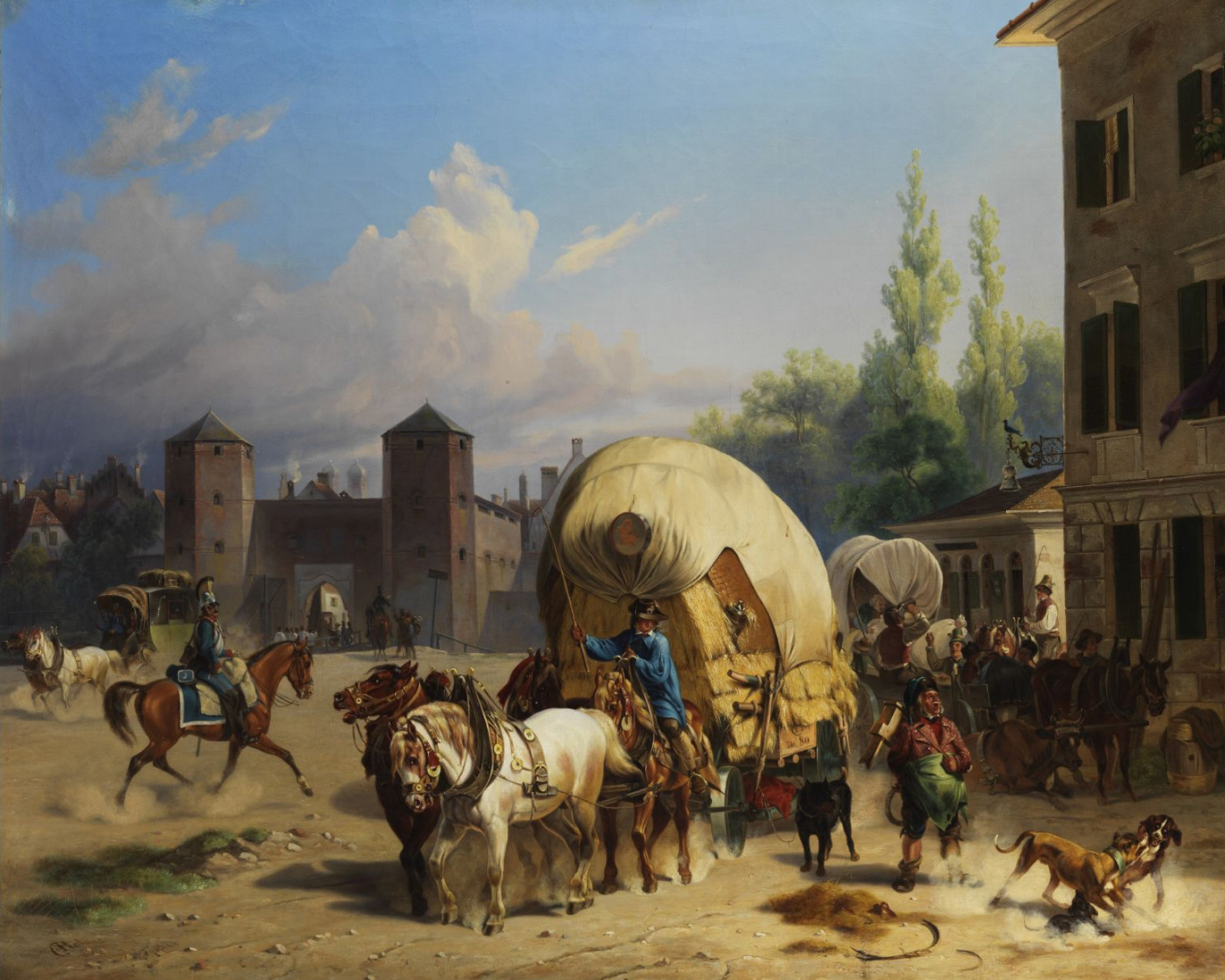 Christian Frederick Carl Holm: Buntes Treiben vor dem Sendlinger Tor in München, datiert 1840, Öl auf Leinwand, 72 x 90 cm.